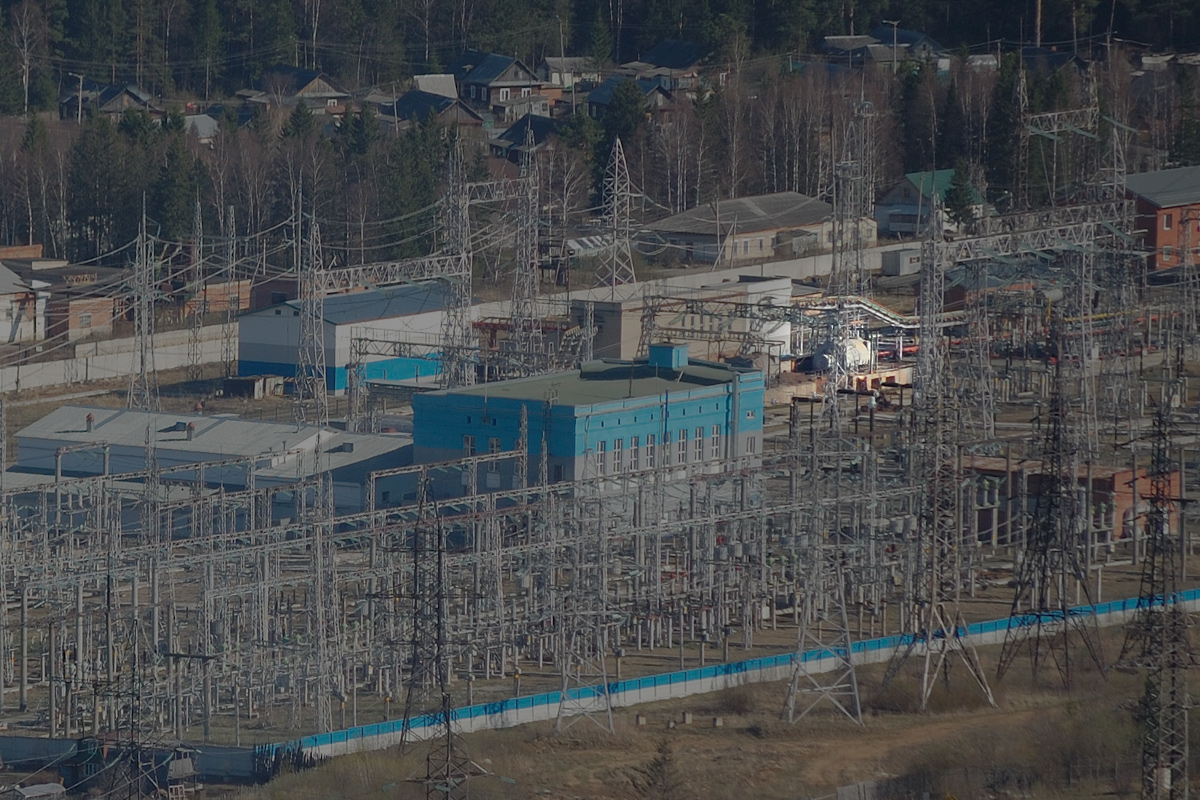 Синхронный компенсатор реактивной мощности на подстанции 500 кВ «Златоуст»